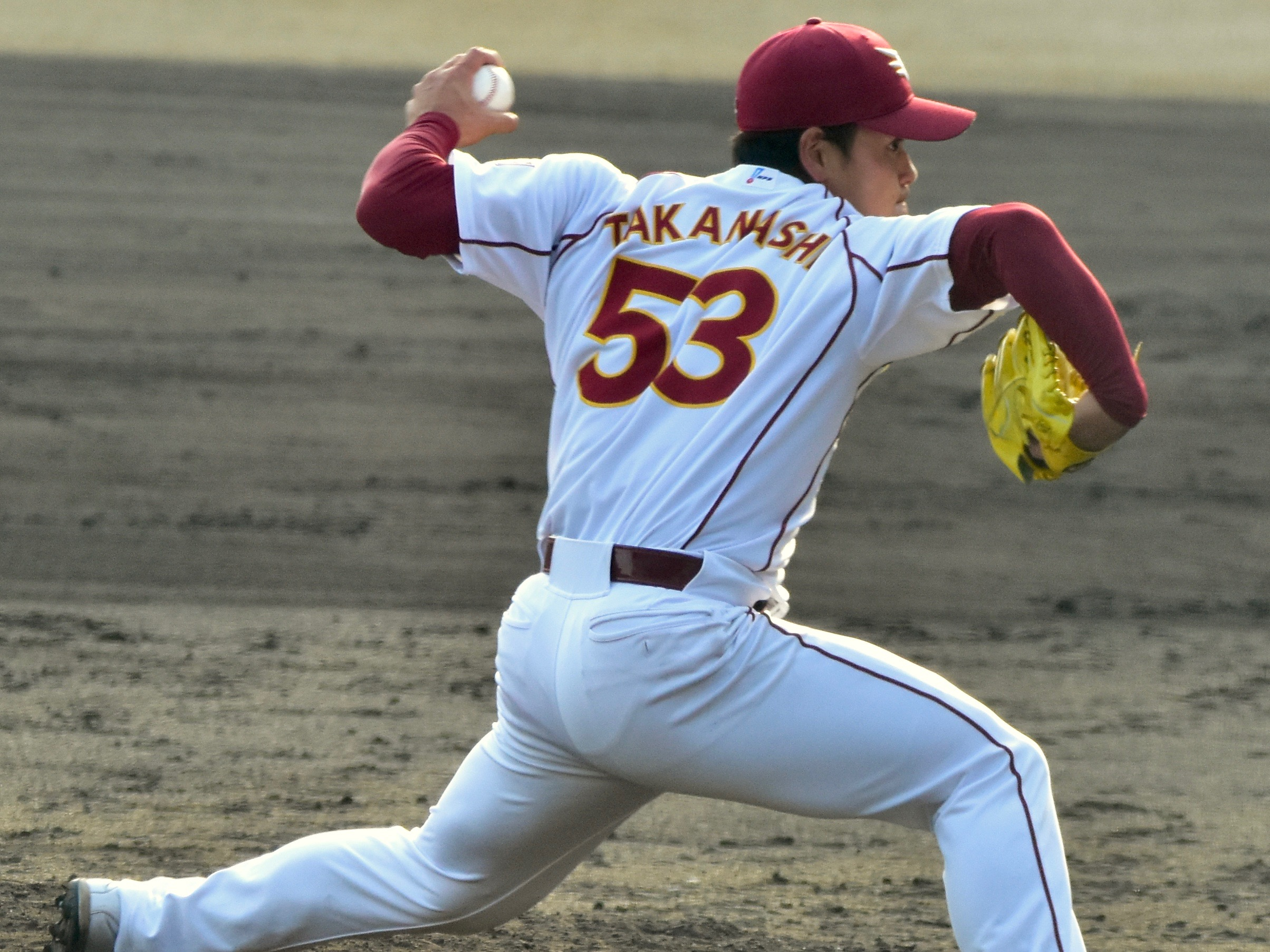 倉敷マスカットスタジアムにて撮影